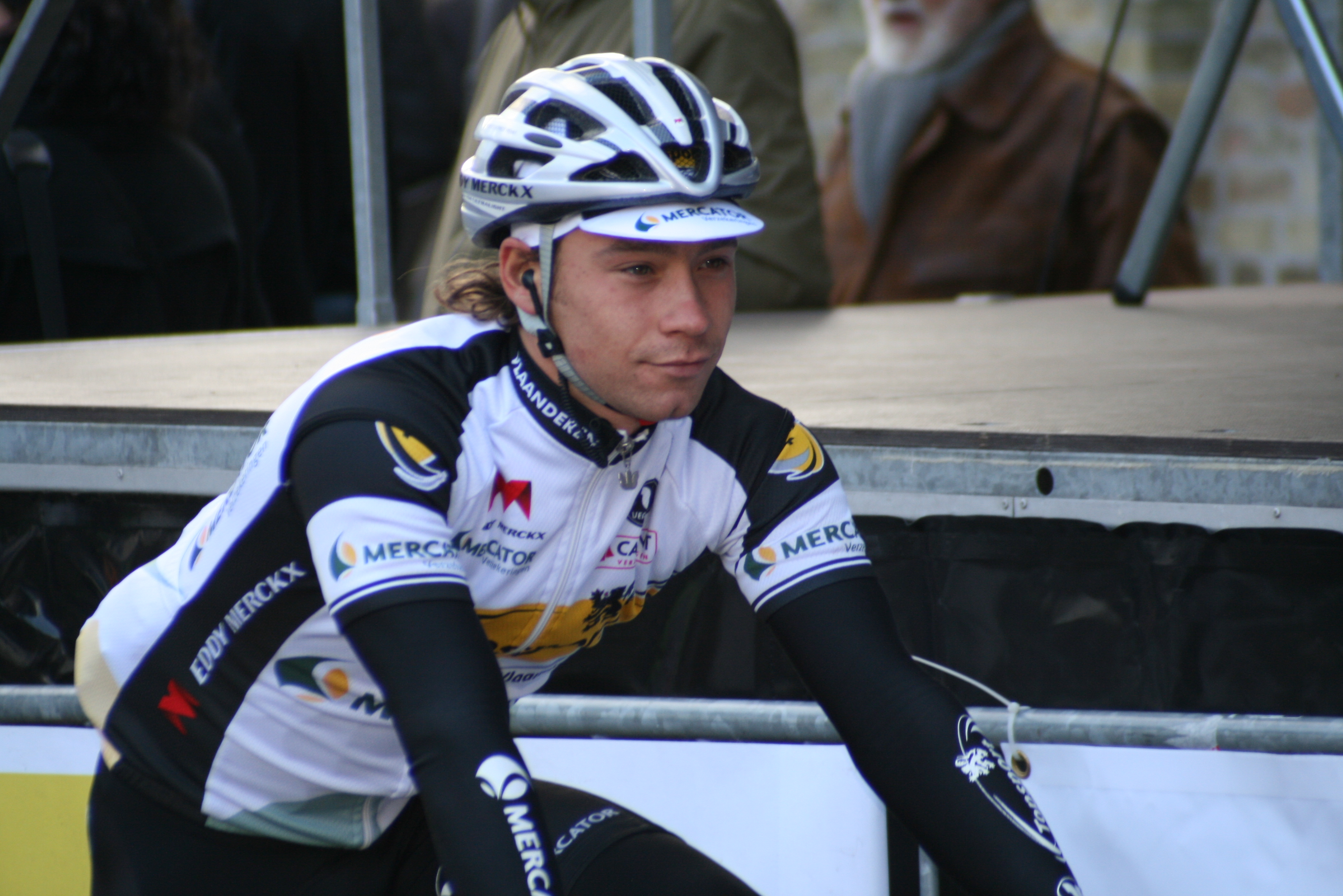 Michael Van Staeyen lors des Trois jours de Flandre occidentale 2010